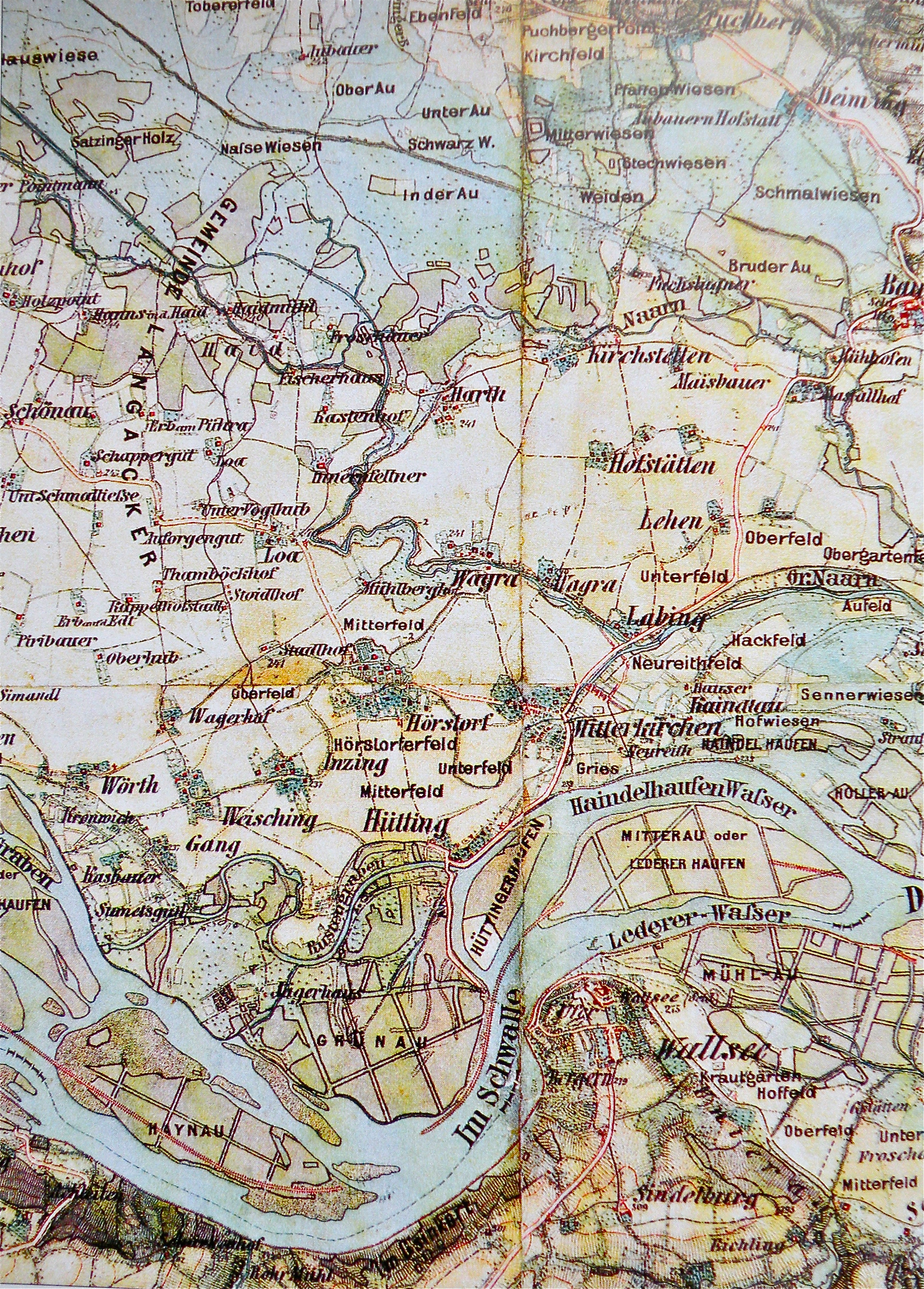 Franzisko-josefinische Landaufnahme aus den Jahren 1869 bis 1887 im Maßstab 25.000. Der Kartenausschnitt zeigt den damaligen Verlauf der Flüsse Donau und Naarn sowie die damalige Siedlungsstruktur von Mitterkirchen. Die Karte ist in dieser Form in folgendem Buch abgedruckt: Franz Asanger: Mitterkirchen - Ein historisches Porträt der Machlandgemeinde, Marktgemeindeamt Mitterkirchen im Machland (Herausgeber), Mitterkirchen 1999, S 178.